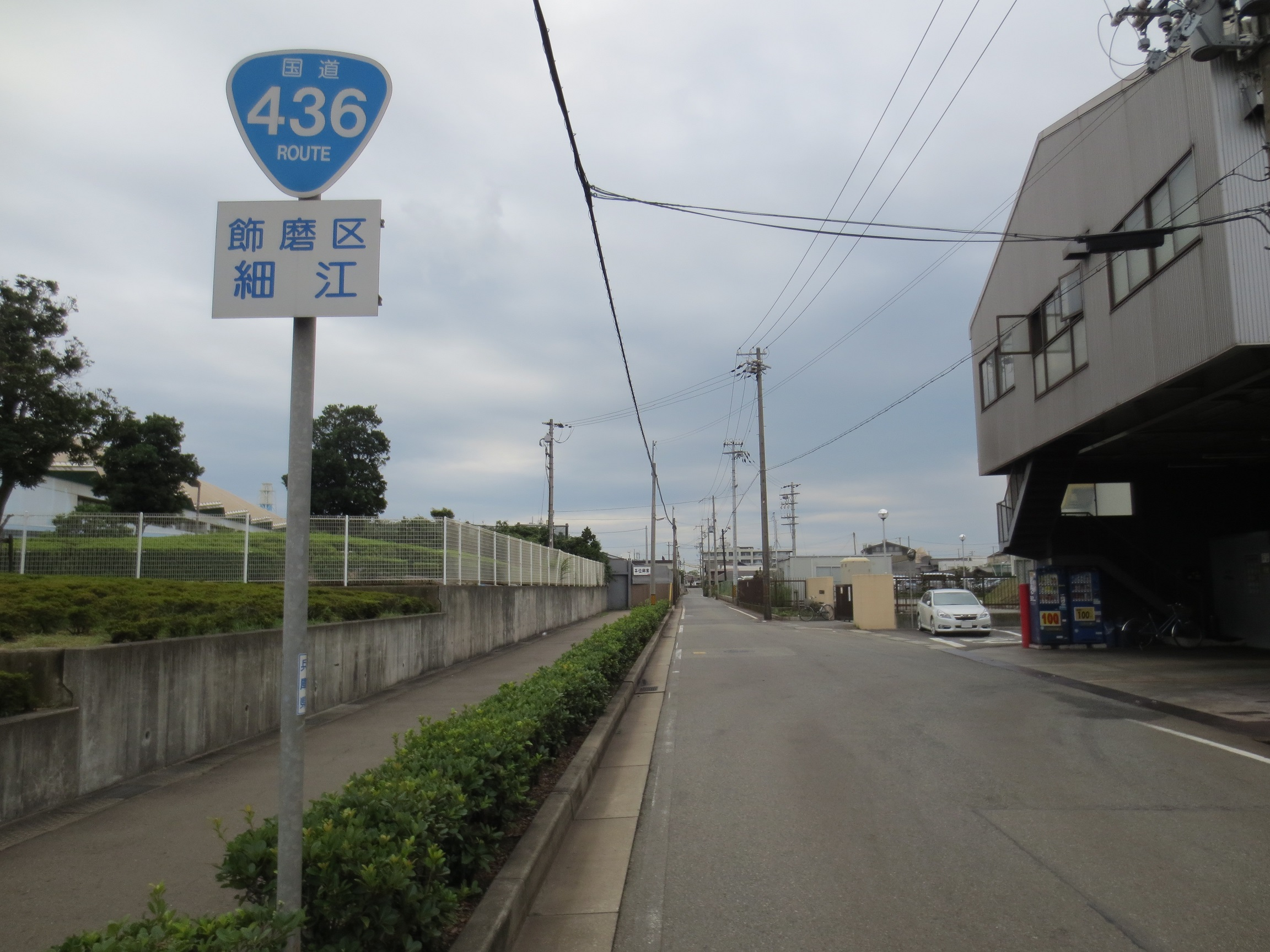 姫路市飾磨区細江、姫路みなとドーム前を通る国道436号。